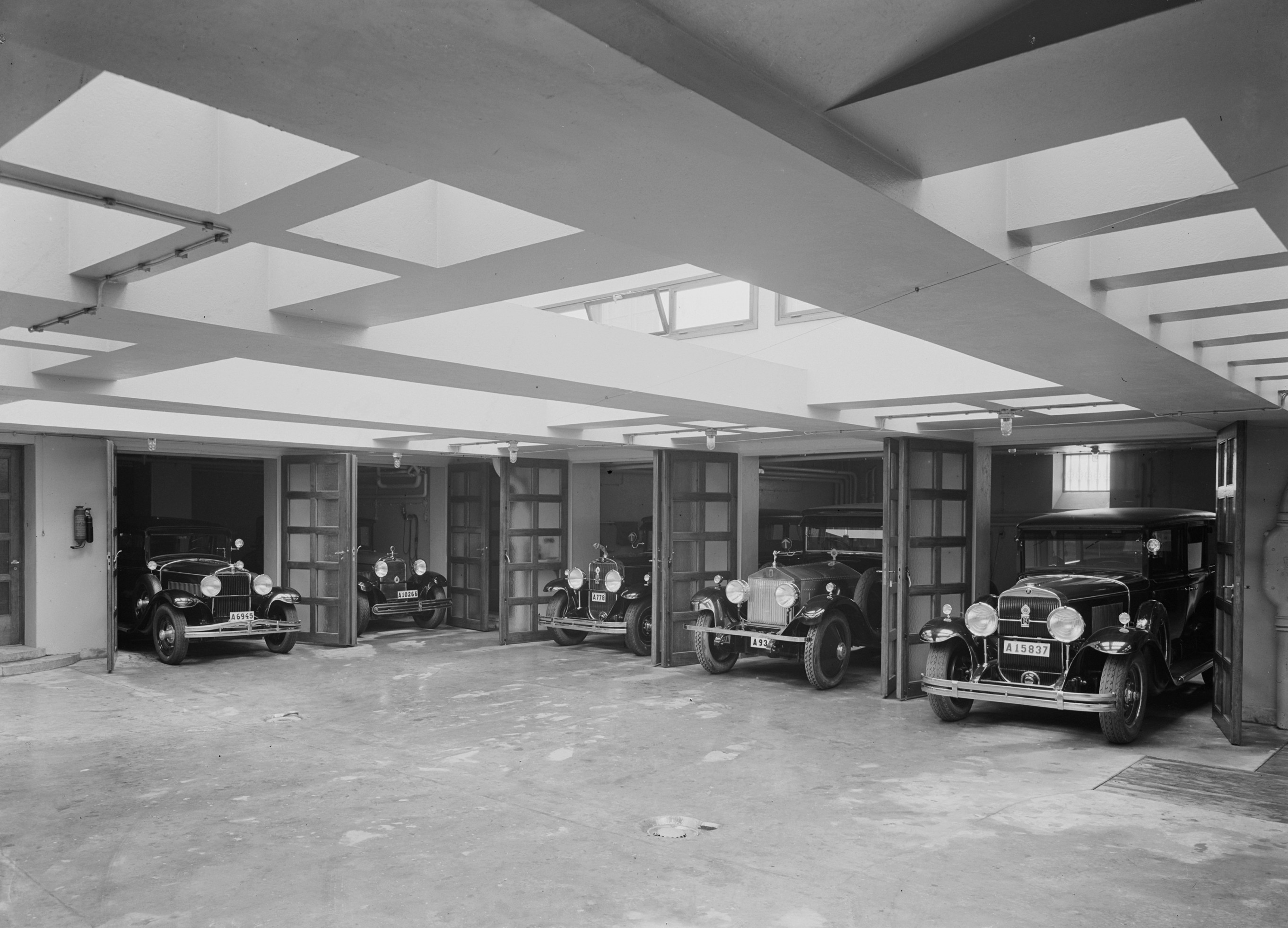 Tändstickspalatsets Garage. Bilarna är, från vänster, en Chevrolet International (1929), en Studebaker Dictator , en Lincoln L-Series, en Rolls-Royce Phantom I och en Studebaker President.